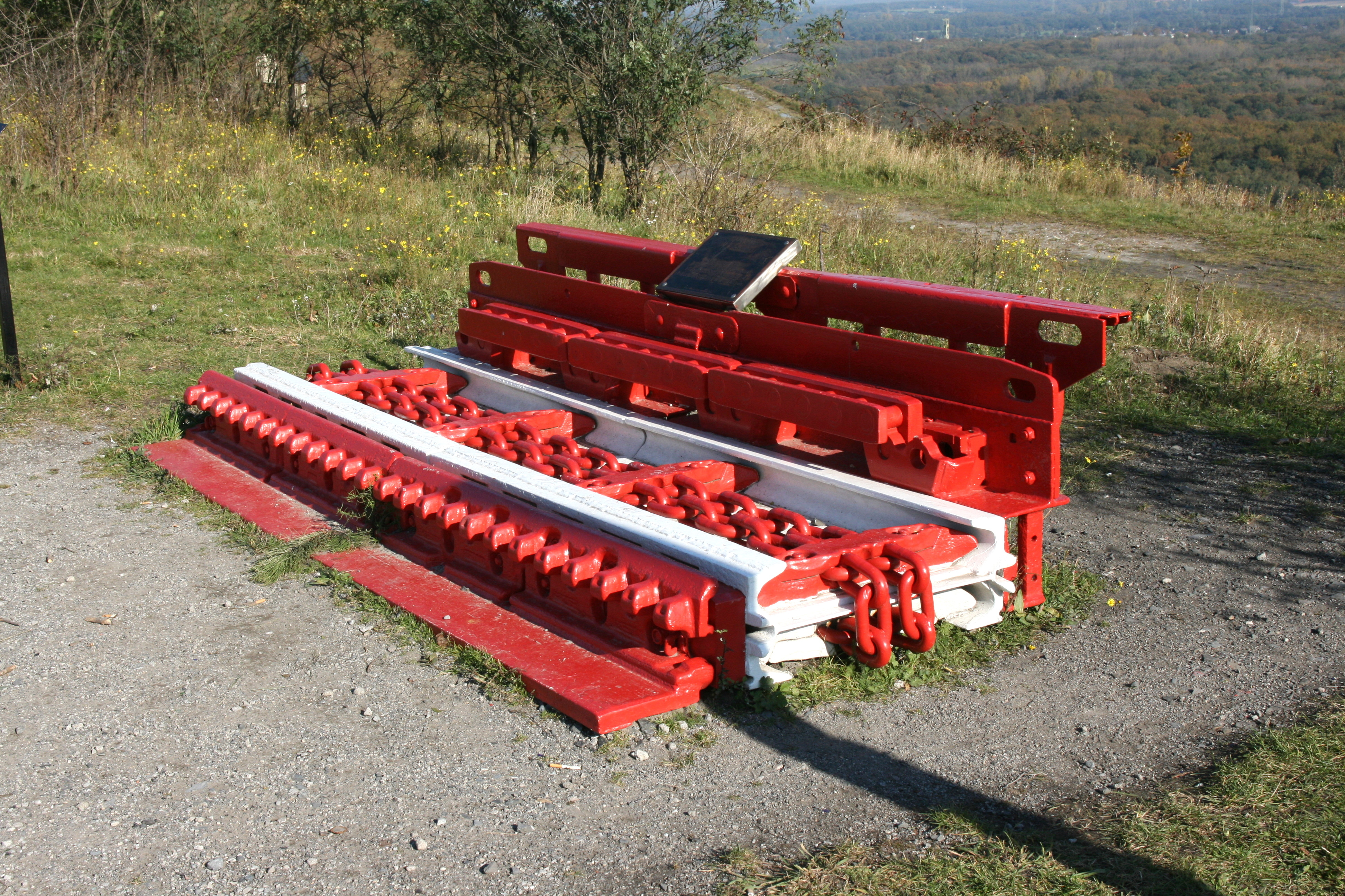 Kreuzweg, Station 13, auf Halde Haniel in Bottrop